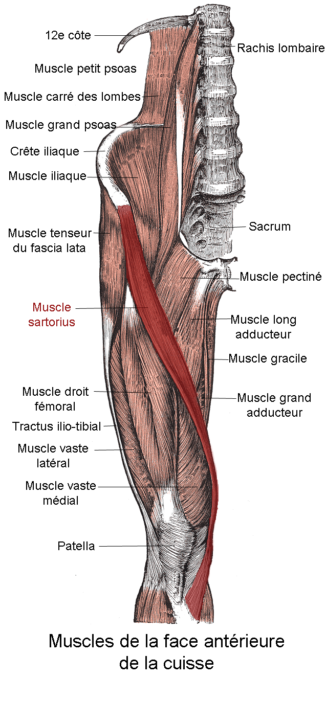 Muscle sartorius. Anatomie humaine